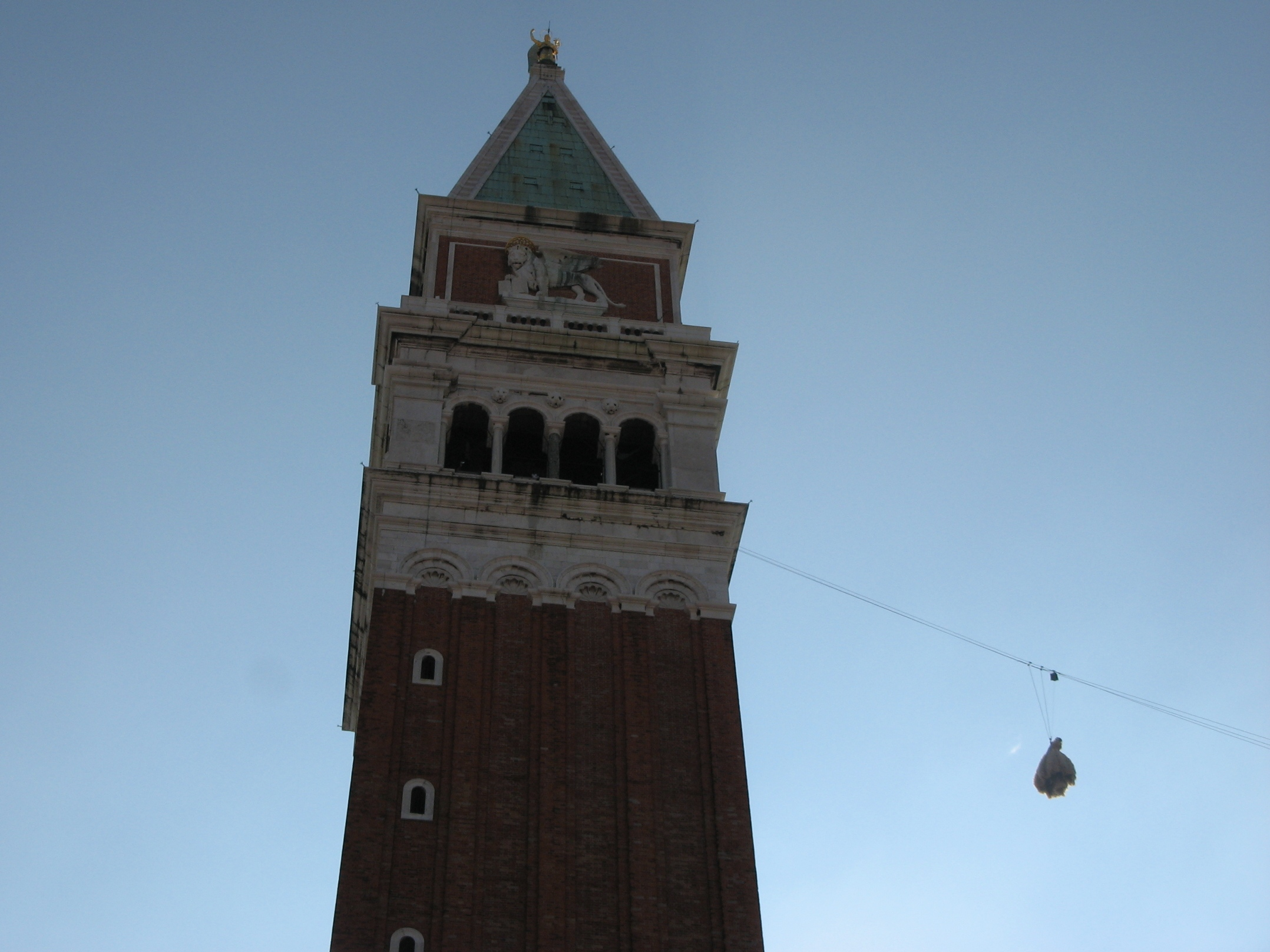 Carnevale di Venezia 2010 - Volo dell'Angelo